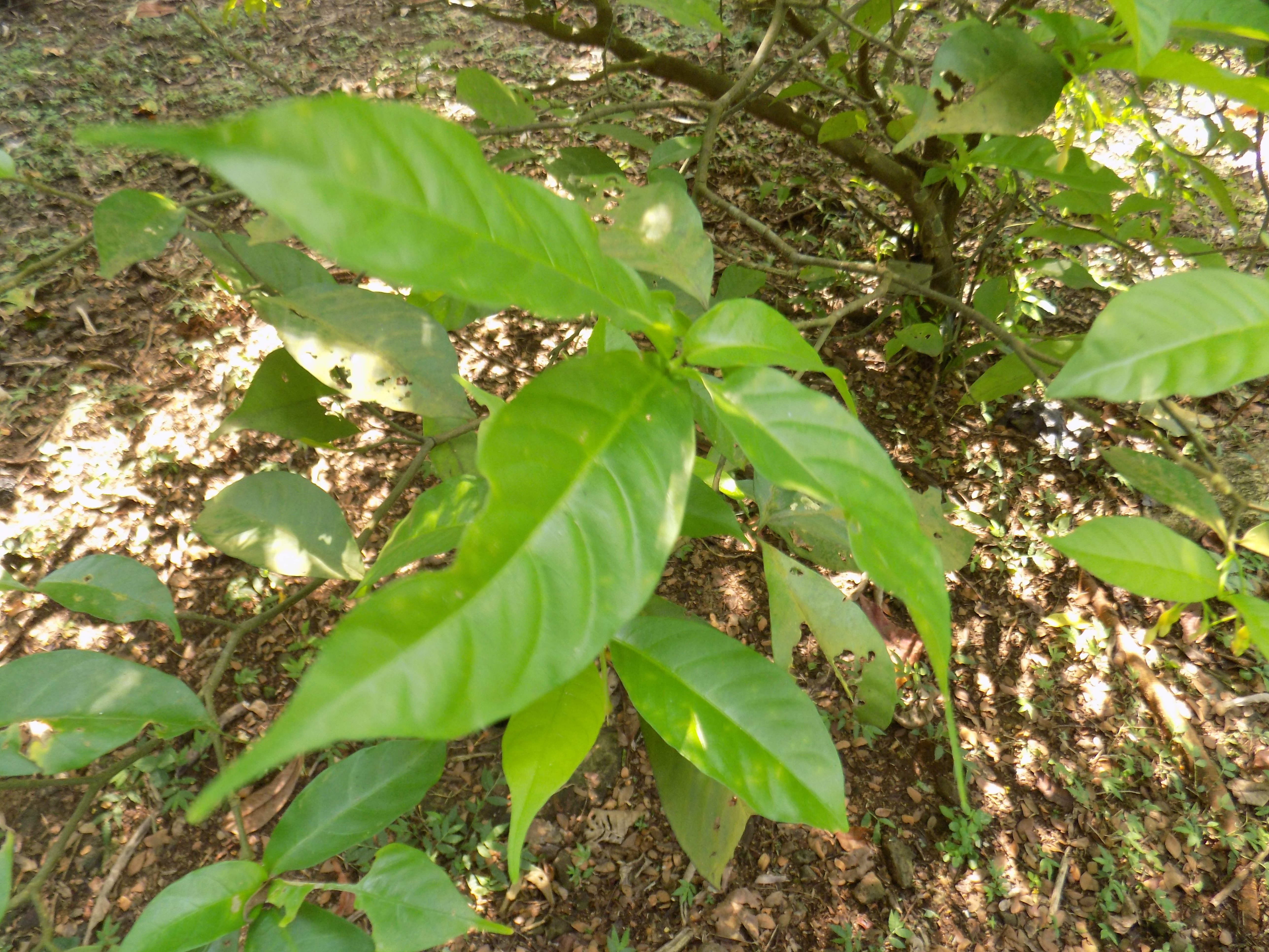 L'iboga (Tabernanthe iboga) est un petit arbuste de la famille des Apocynacées qui se rencontre en Afrique dans la forêt équatoriale. Jardin botanique de Limbé, Région du Sud-Ouest, Cameroun